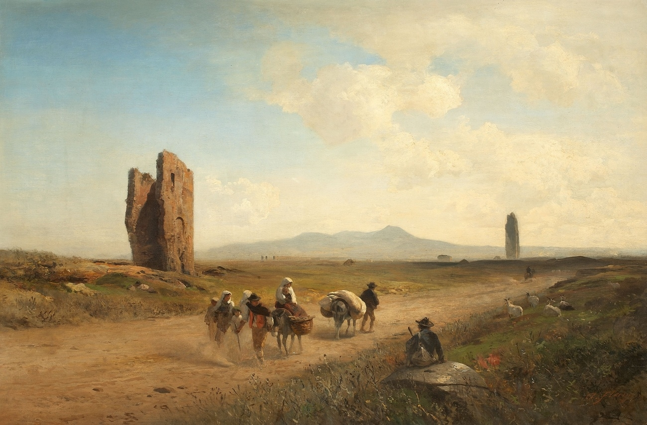 Römische Campagnalandschaft mit Ruinen und Bauern. Signiert unten rechts: A. Flamm. Öl auf Leinwand. 75 x 115 cm.